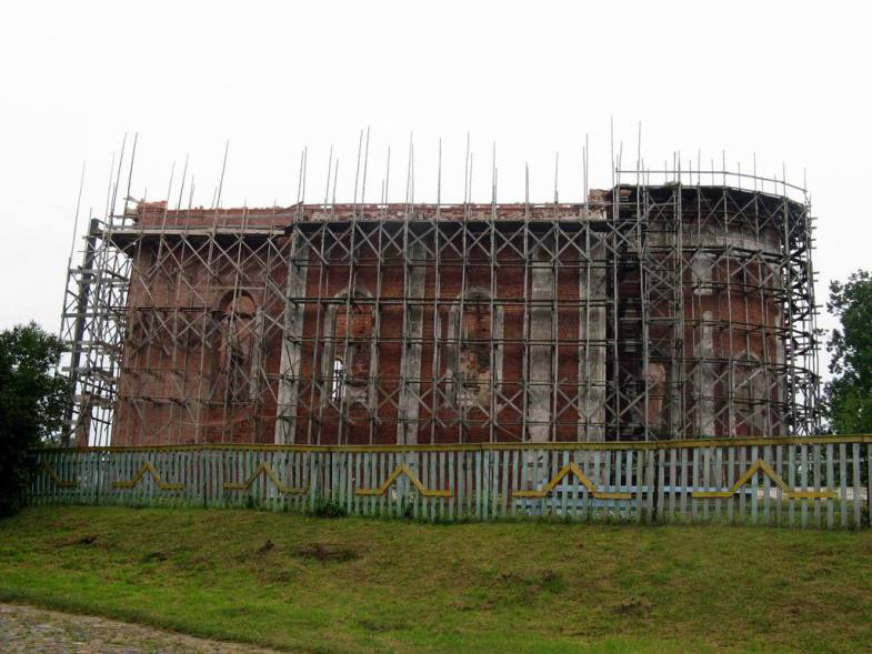 Беларуская (тарашкевіца): Дзісна